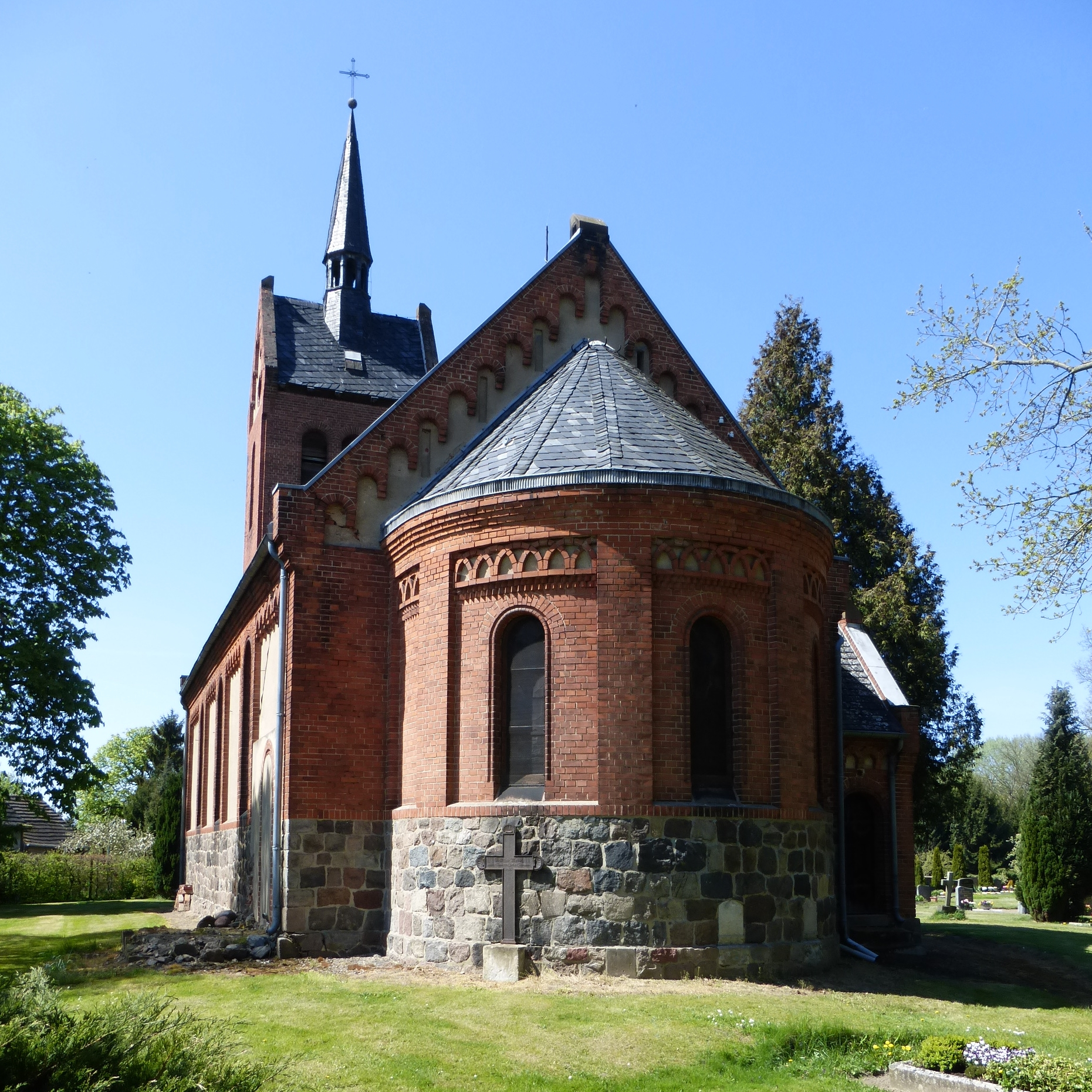 Kirche in Wittenmoor (Altmark)